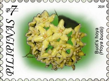 Philippine hoyas